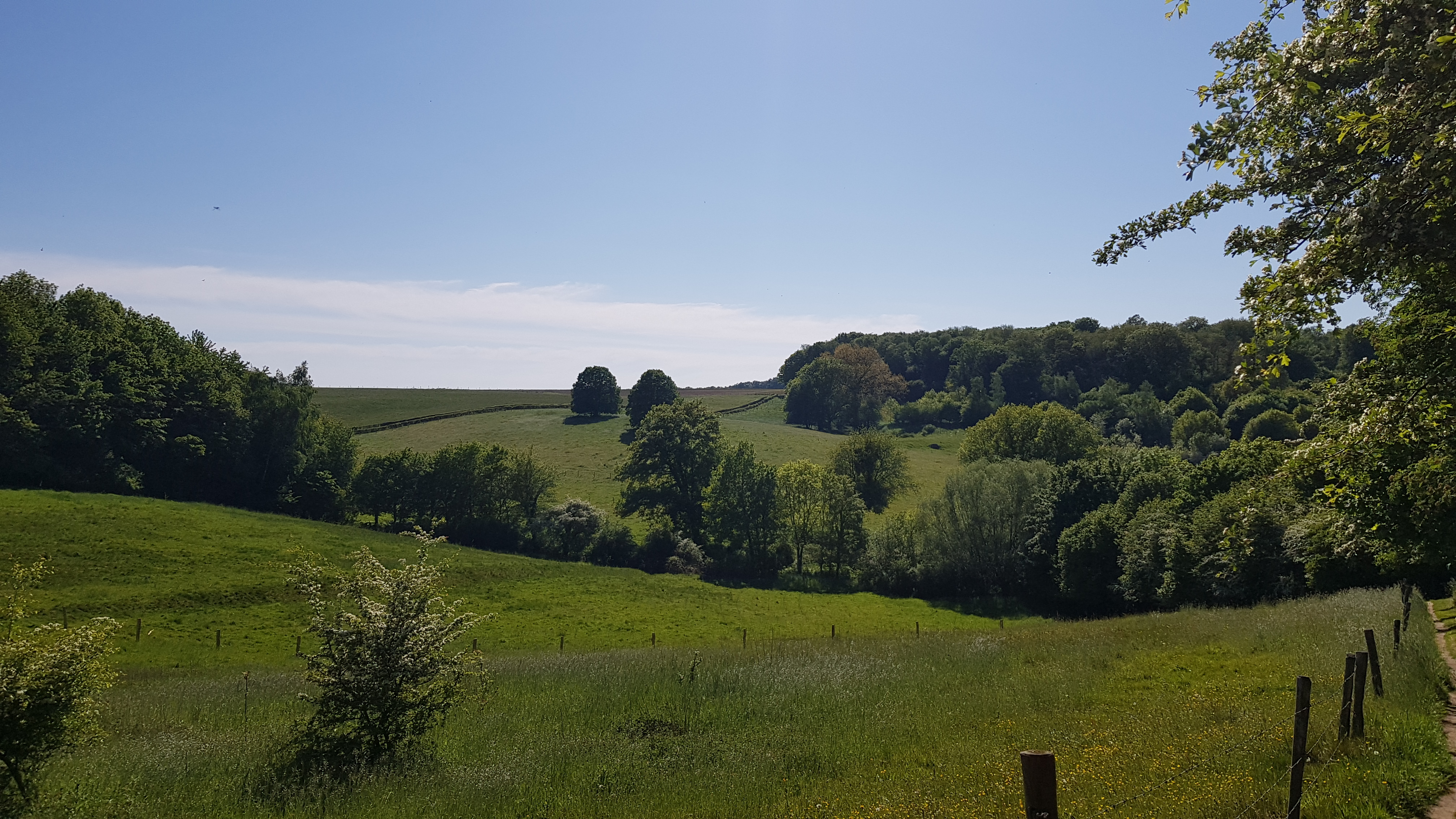 Pesakerdal, Pesaken, Nederland